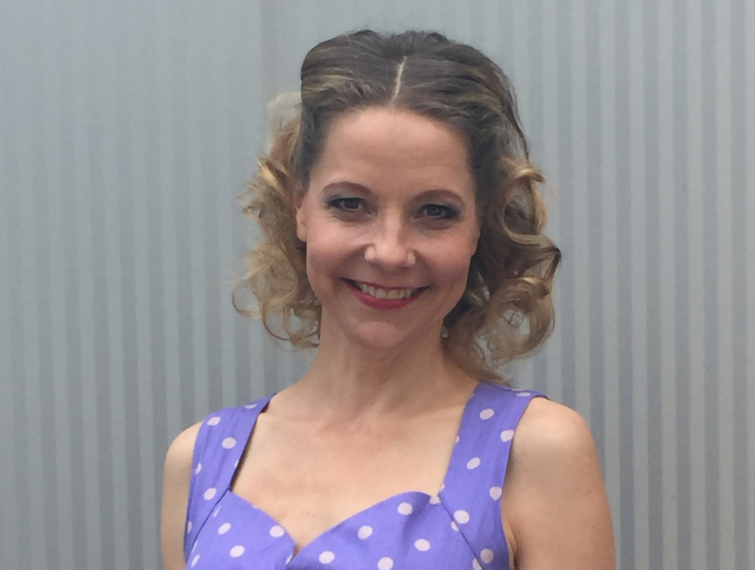 privat